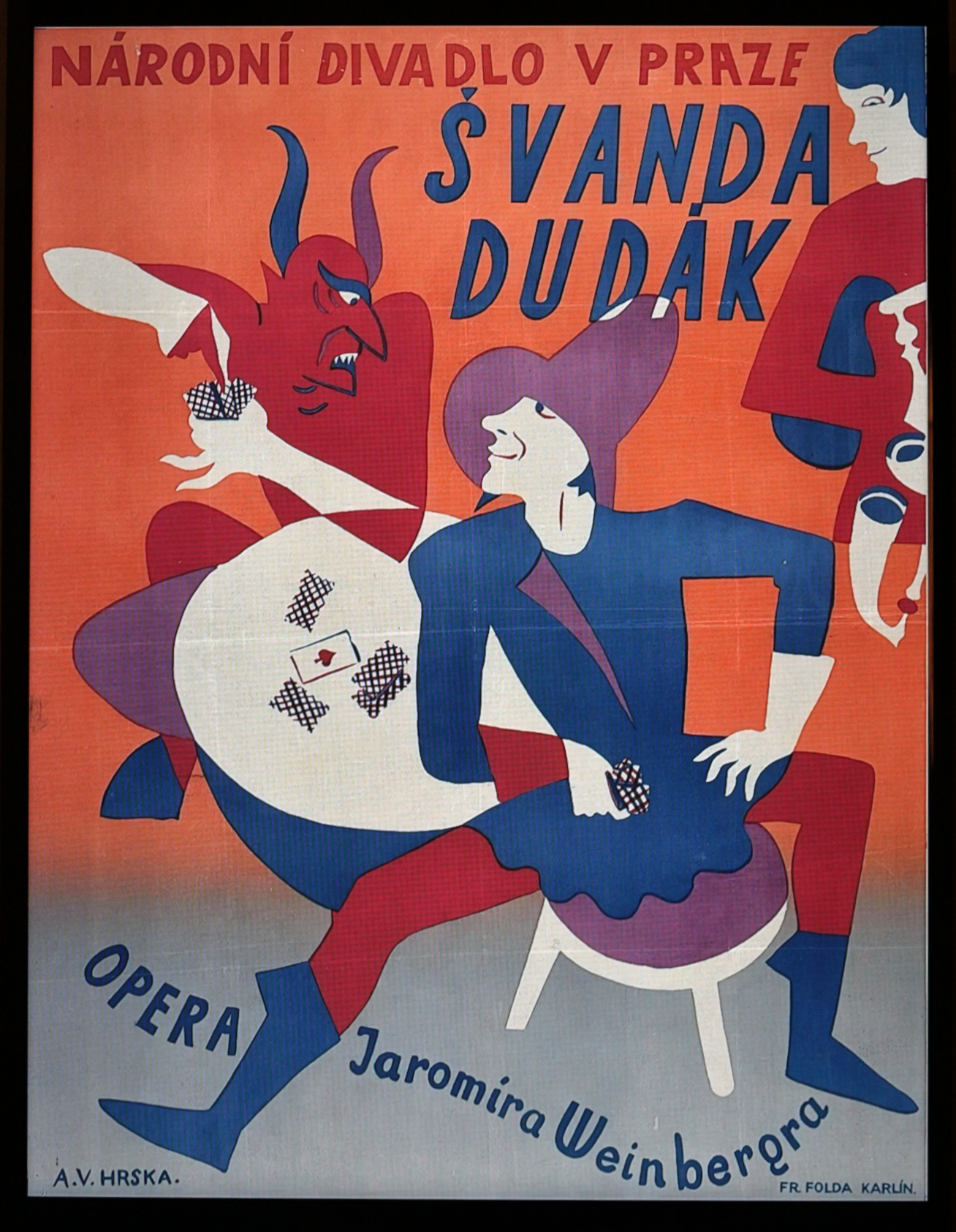 Plakát Alexandra V. Hrsky k opeře Švanda dudák J. Weinbergra, ND Praha 1927